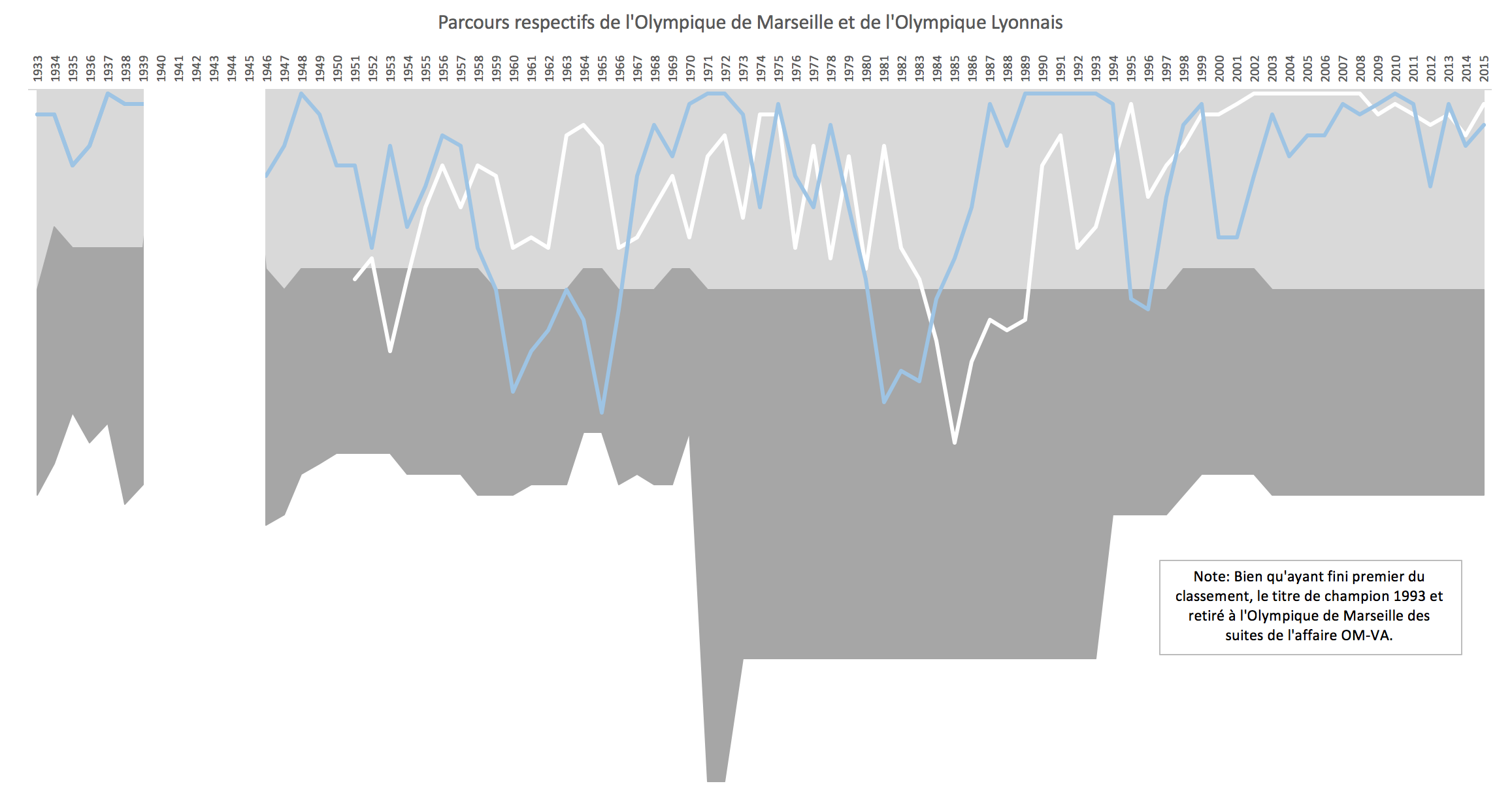 OM OL Classements comparés